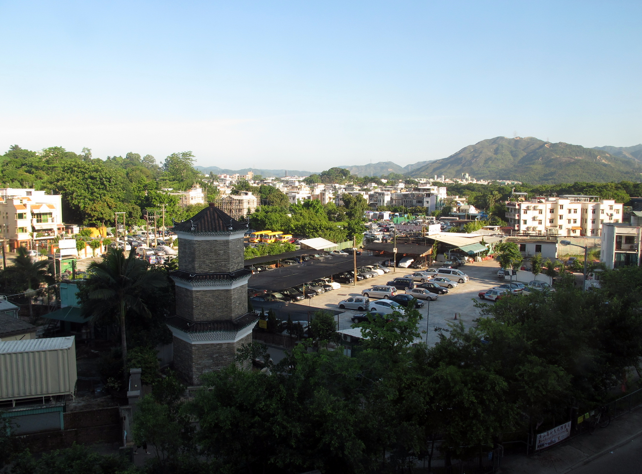 Ping Shan